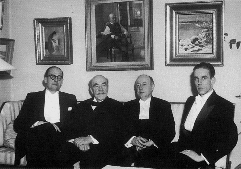 Mikko Juvan väitöskaronkka Helsingin yliopistossa. Oikealta Mikko Juva, Einar W. Juva, Martti Ruuth, Martti Ruutu.